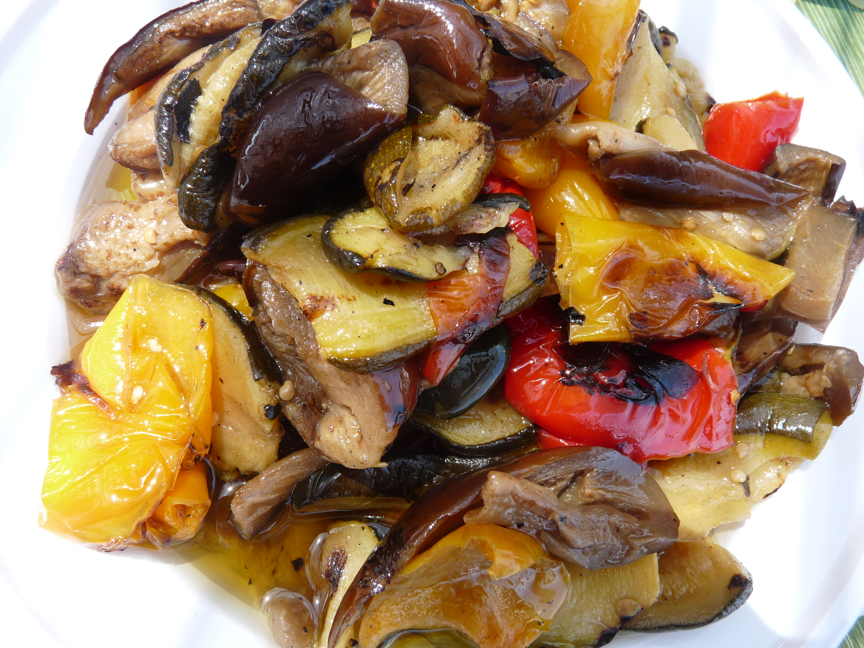 Ratatouille (îles Eoliennes, Sicile)